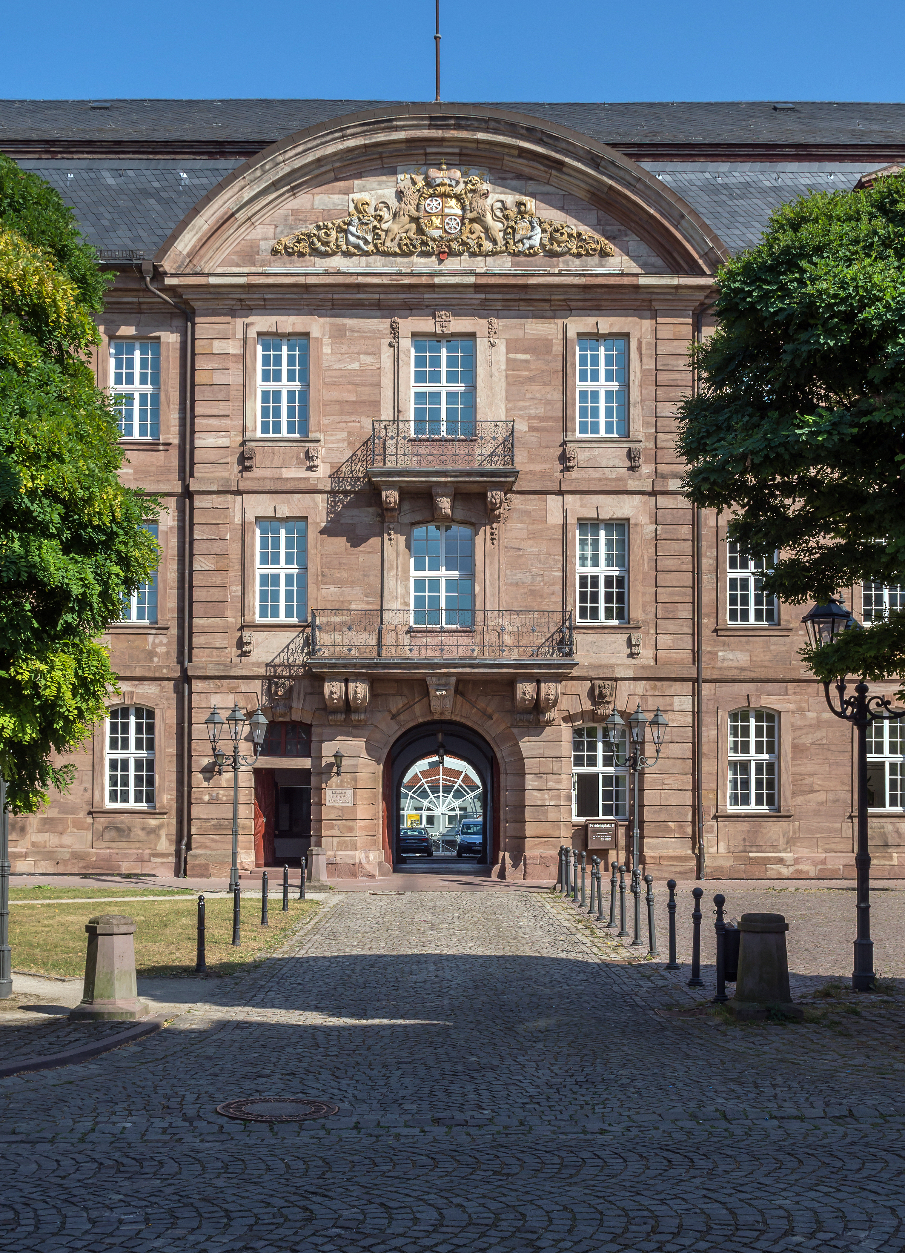 Heilbad Heiligenstadt (Eichsfeld) Friedensplatz 8 Kurmainzisches Schloss und ehemaliges Oberamtshaus 12